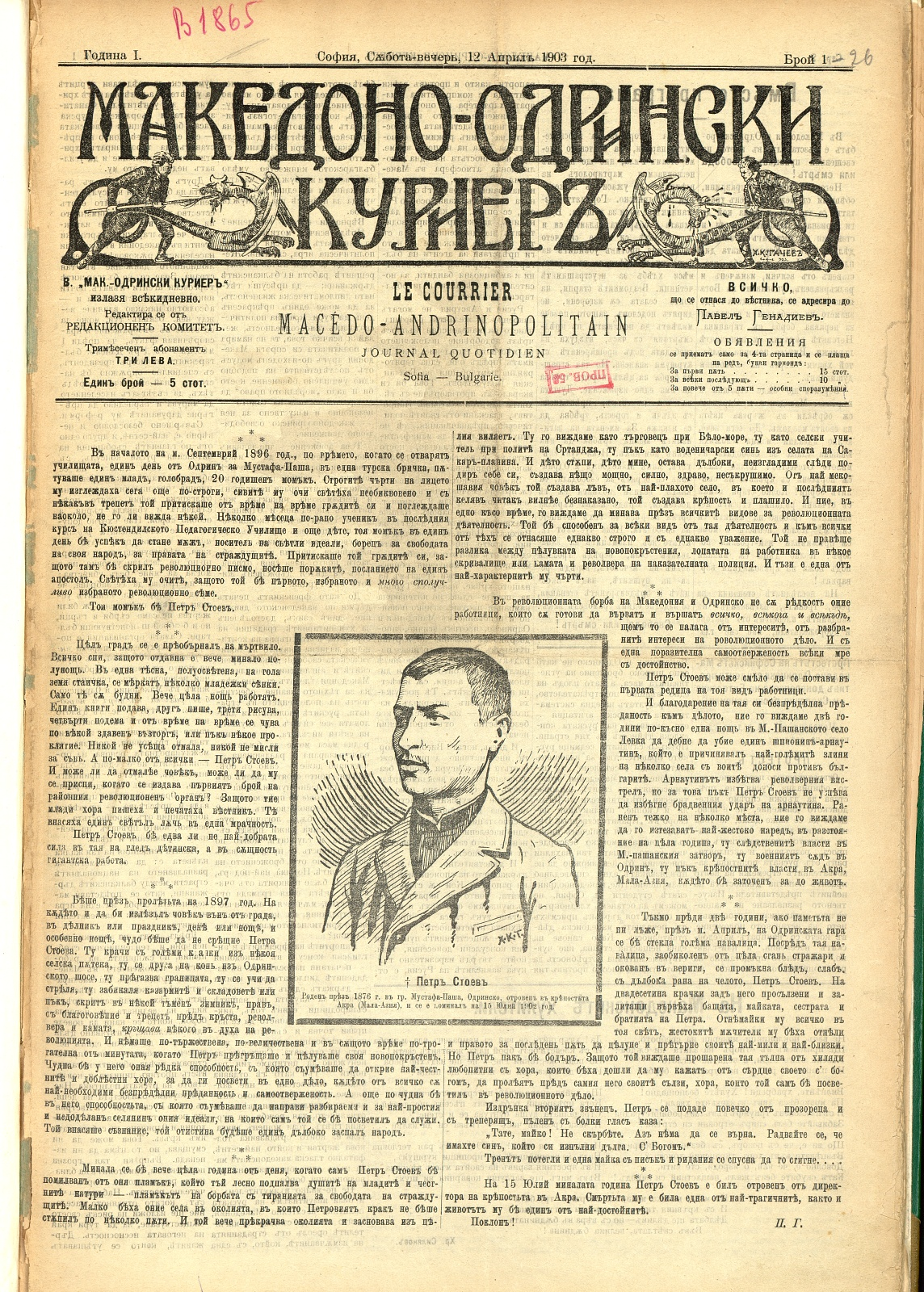 Вестник "Македоно-одрински куриер", брой 1, 12 април 1903.